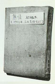 Mujung, written by Yi Kwang-su, in Toykyo, 1918